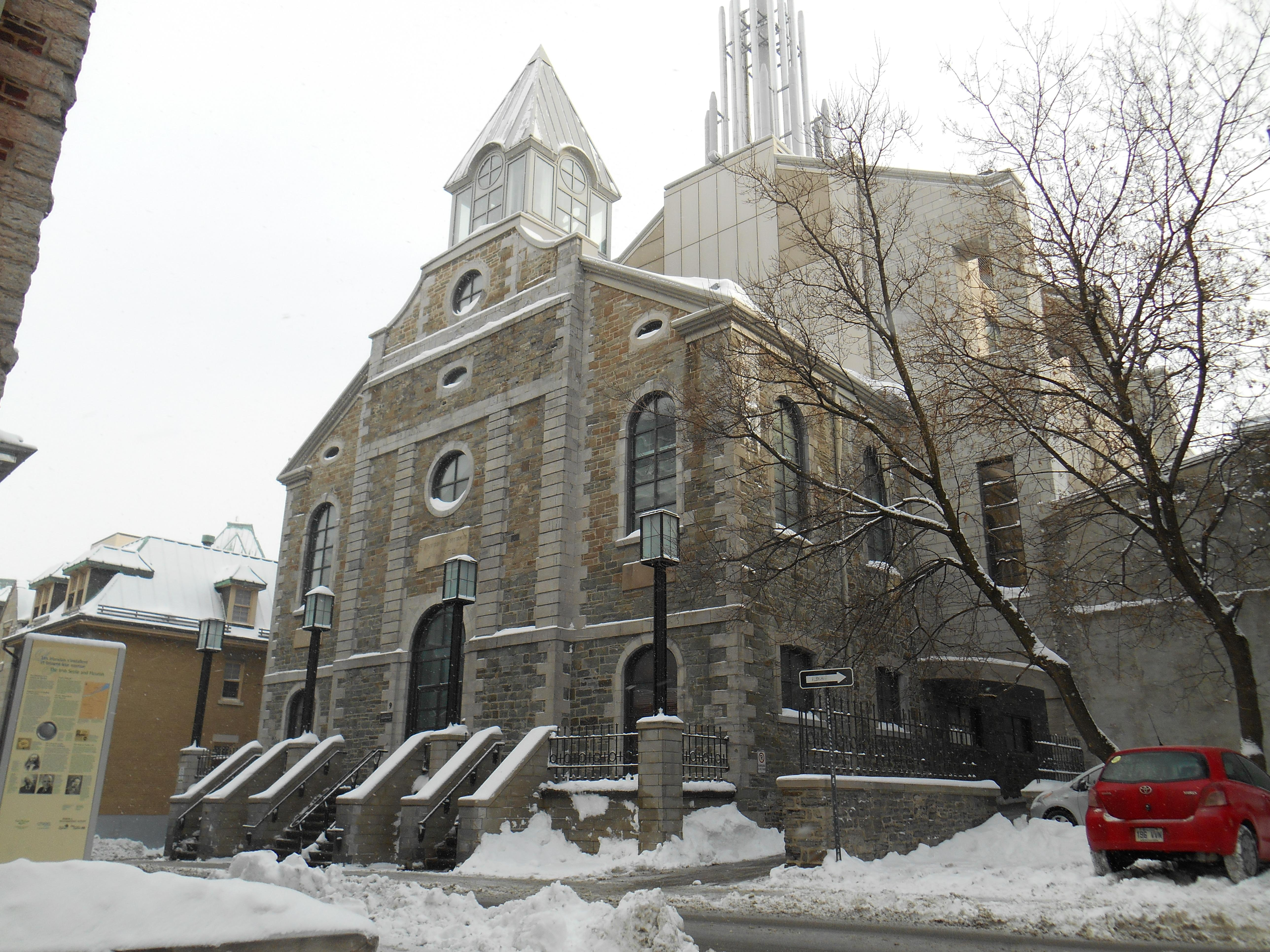 Le St-Patrick, édifice construit en 1997 sur les vestiges de l’ancienne église St-Patrick, 9, rue McMahon, Québec